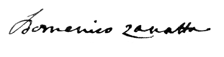 dettaglio della firma tratta da ZANATTA D., lettera Verona 14 Corrente 1716, Coll. Serego B. 349, Biblioteca Civica di Verona.